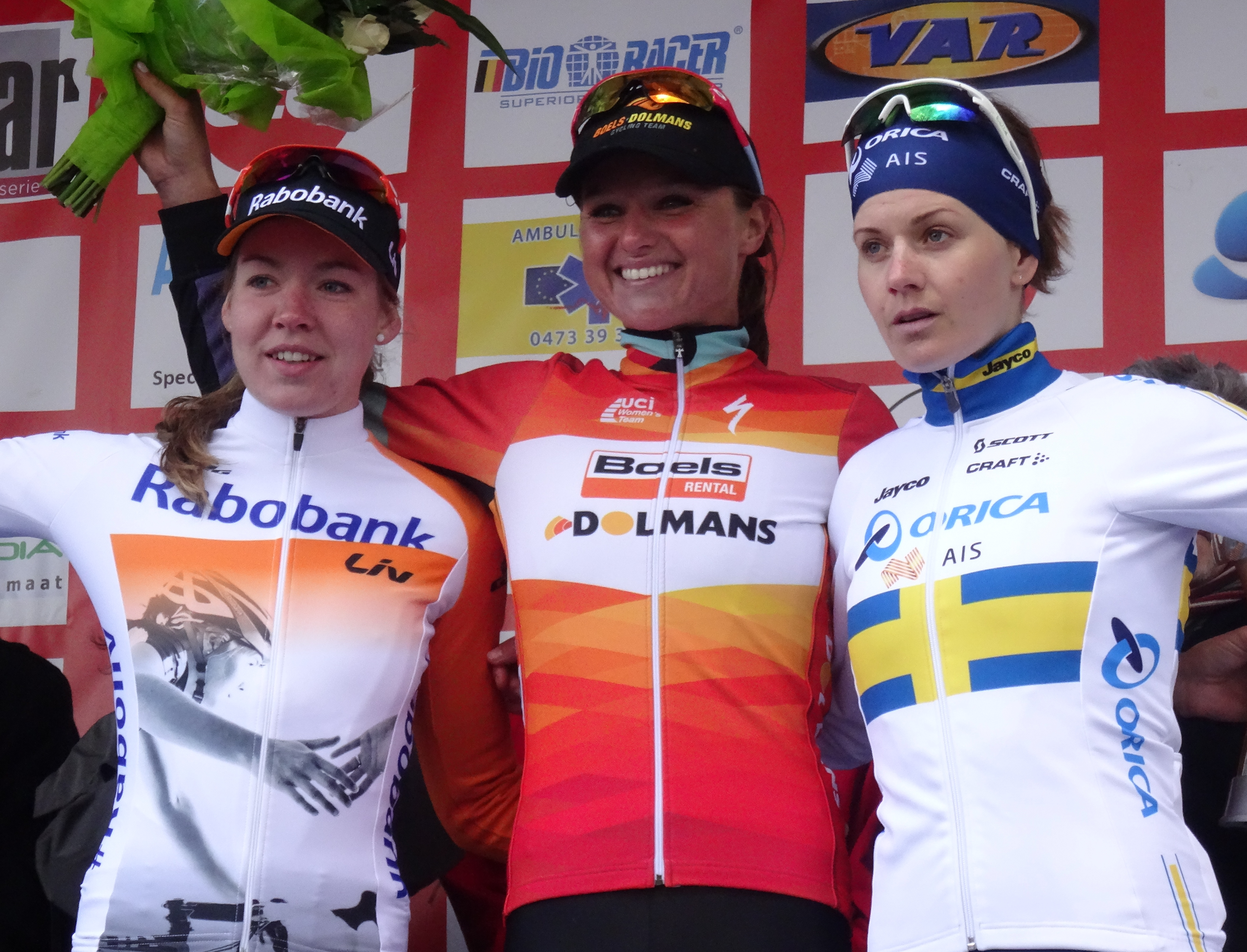 Reportage réalisé le mercredi 4 mars à l'occasion de l'arrivée du Samyn des Dames 2015 et du Samyn 2015 à Dour, Belgique.